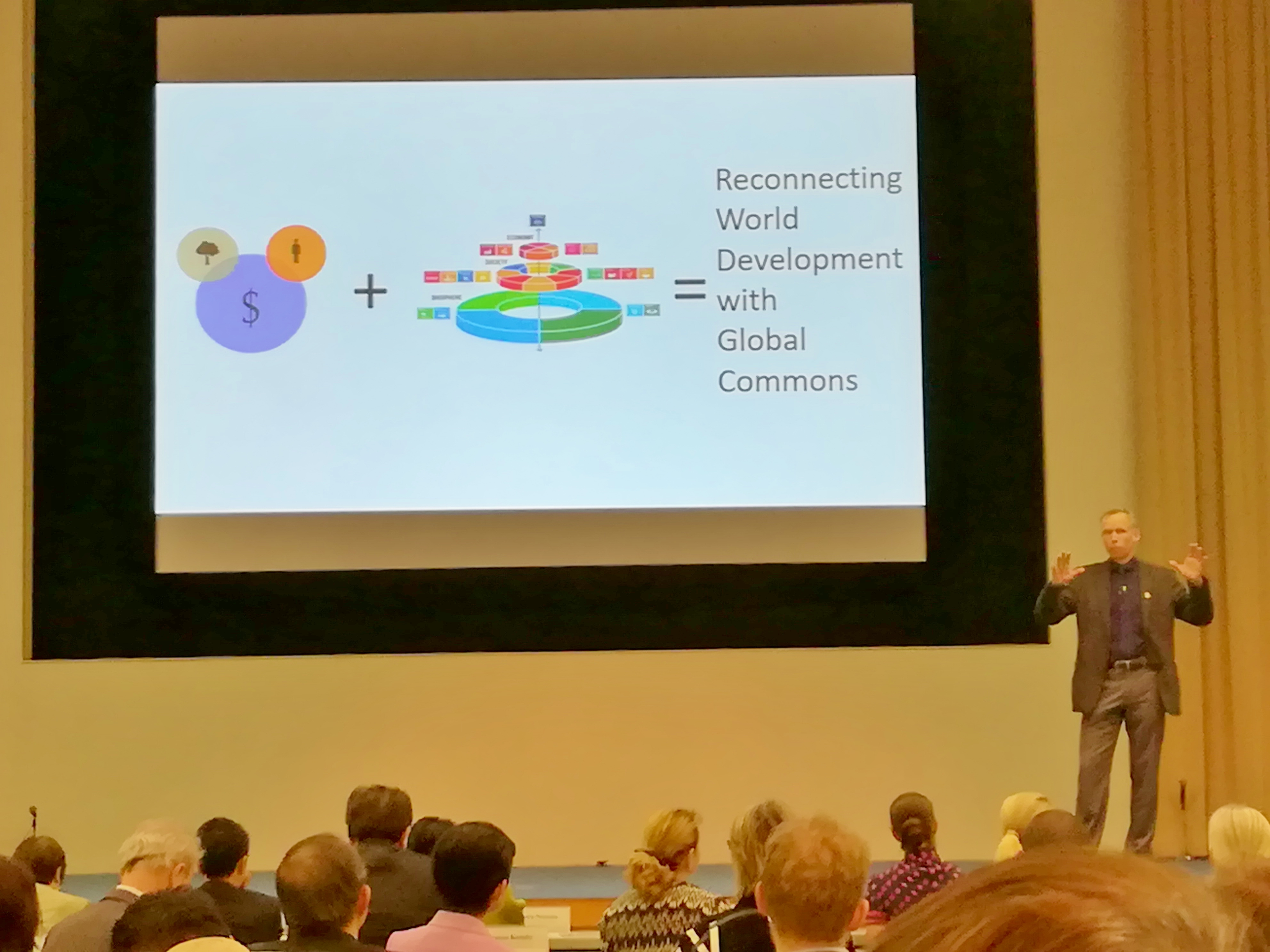 持続可能な開発目標を説明するヨハン・ロックストローム教授。2017年04月19日に東京渋谷の国連大学での国連シンポジウムで撮影。右下の女性はスウェーデン王国ビクトリア皇太子殿下が、中央下の桃色の服をお召しの方は高円宮久子妃殿下です。